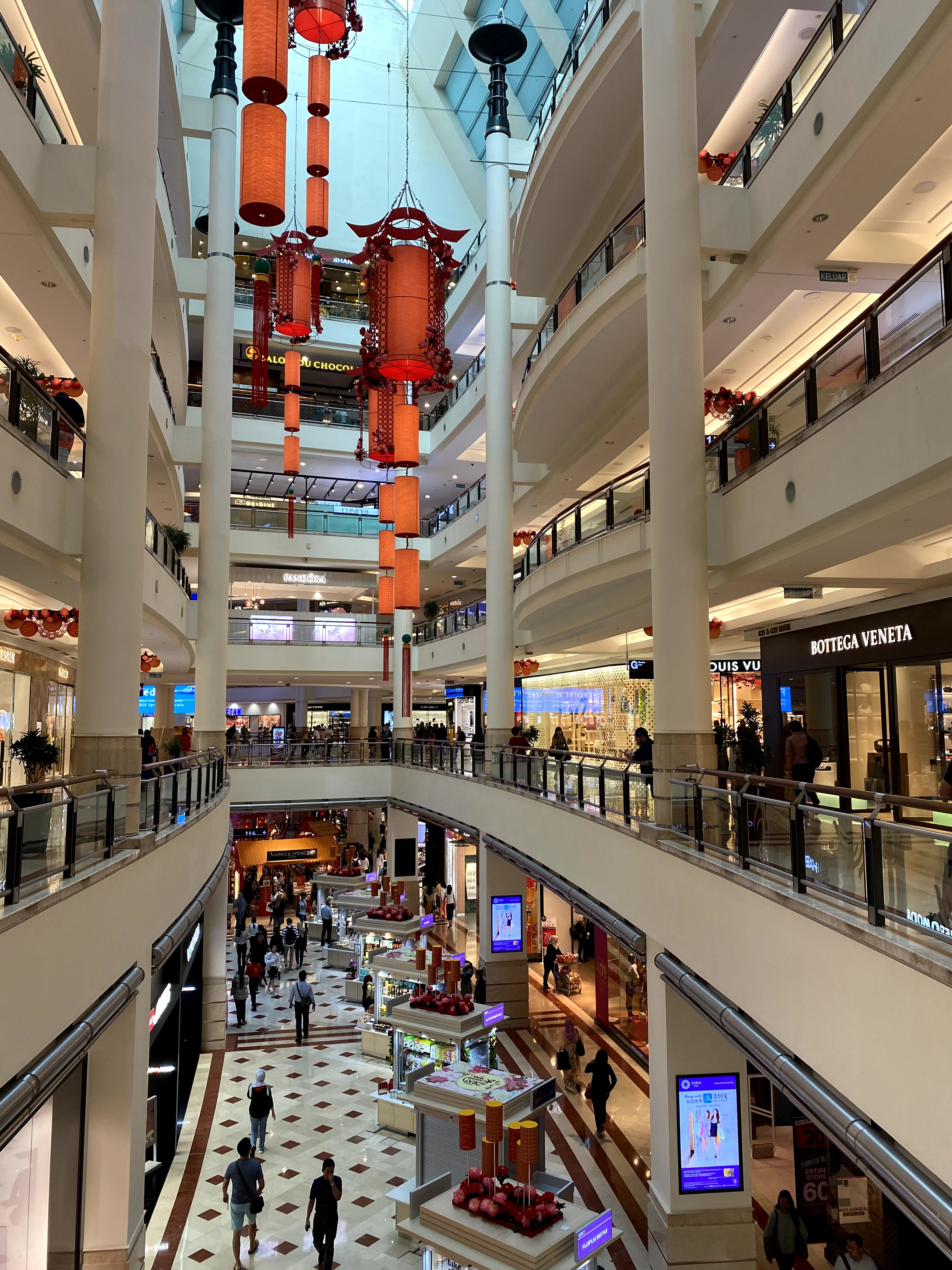 中文（台灣）: 陽光廣場中庭